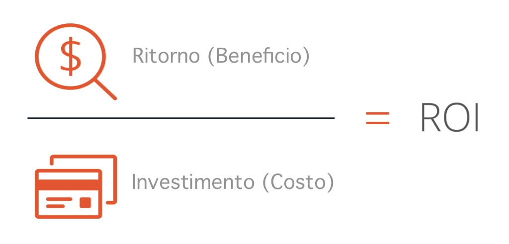 Dall'acronimo inglese ROI, Return Of Investment (Ritorno sull'investimento), il beneficio di ogni investimento è il ritorno che si ha da esso.